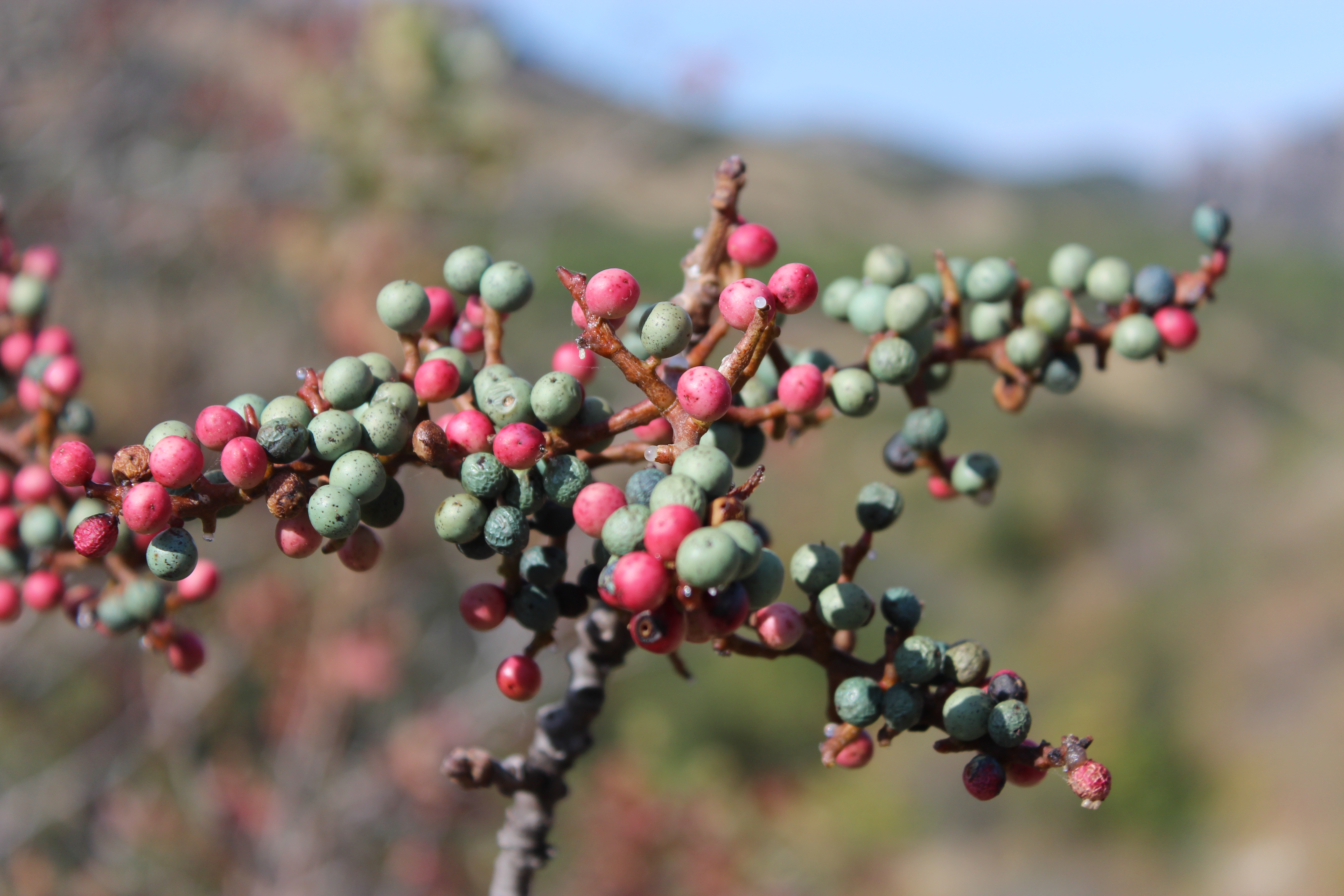 Плоды фисташки туполистной — 26 сентября 2016 года, республика Крым, Карадагский природный заповедник